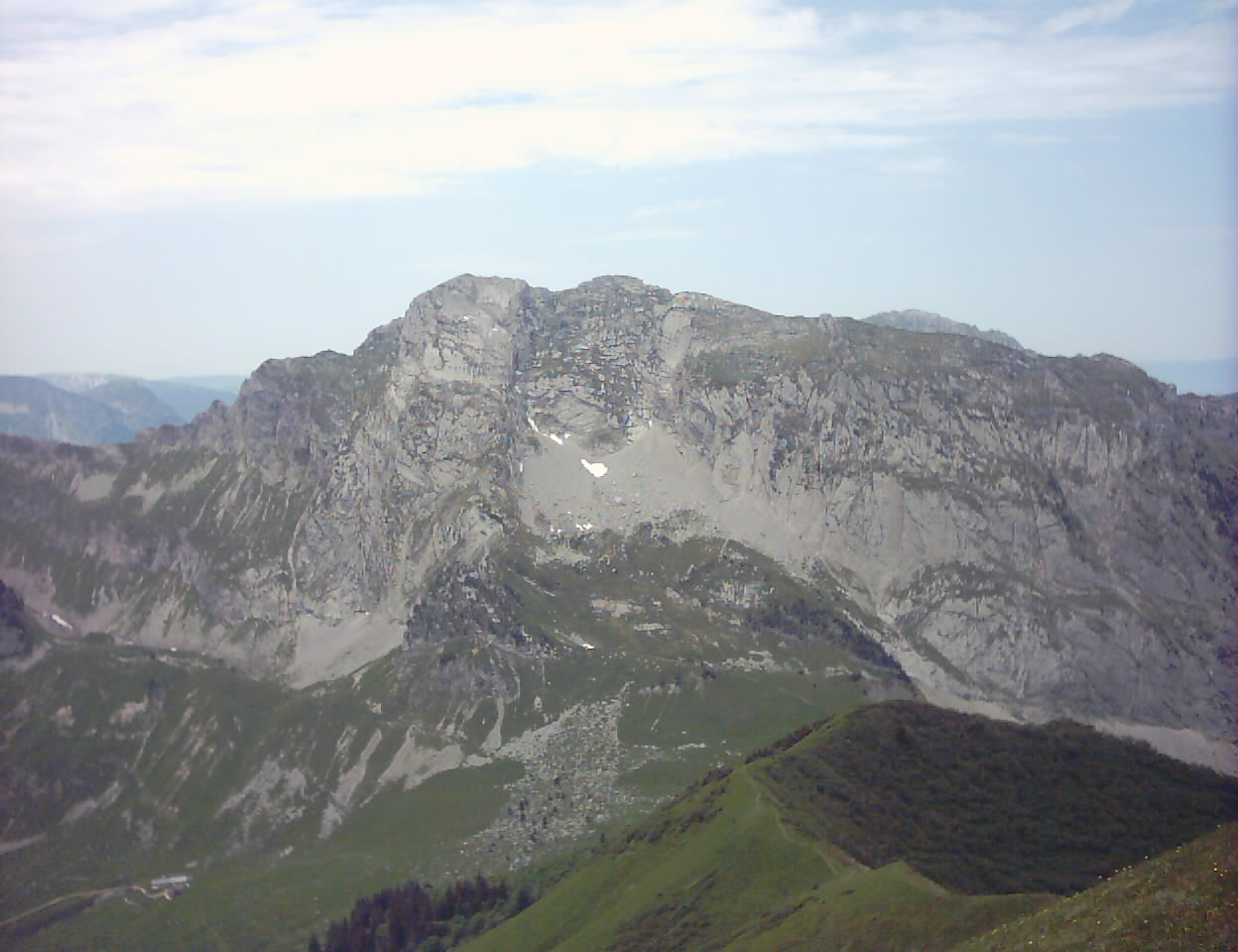 Face Est de l'arcalod, vue de la pointe de la chorionde